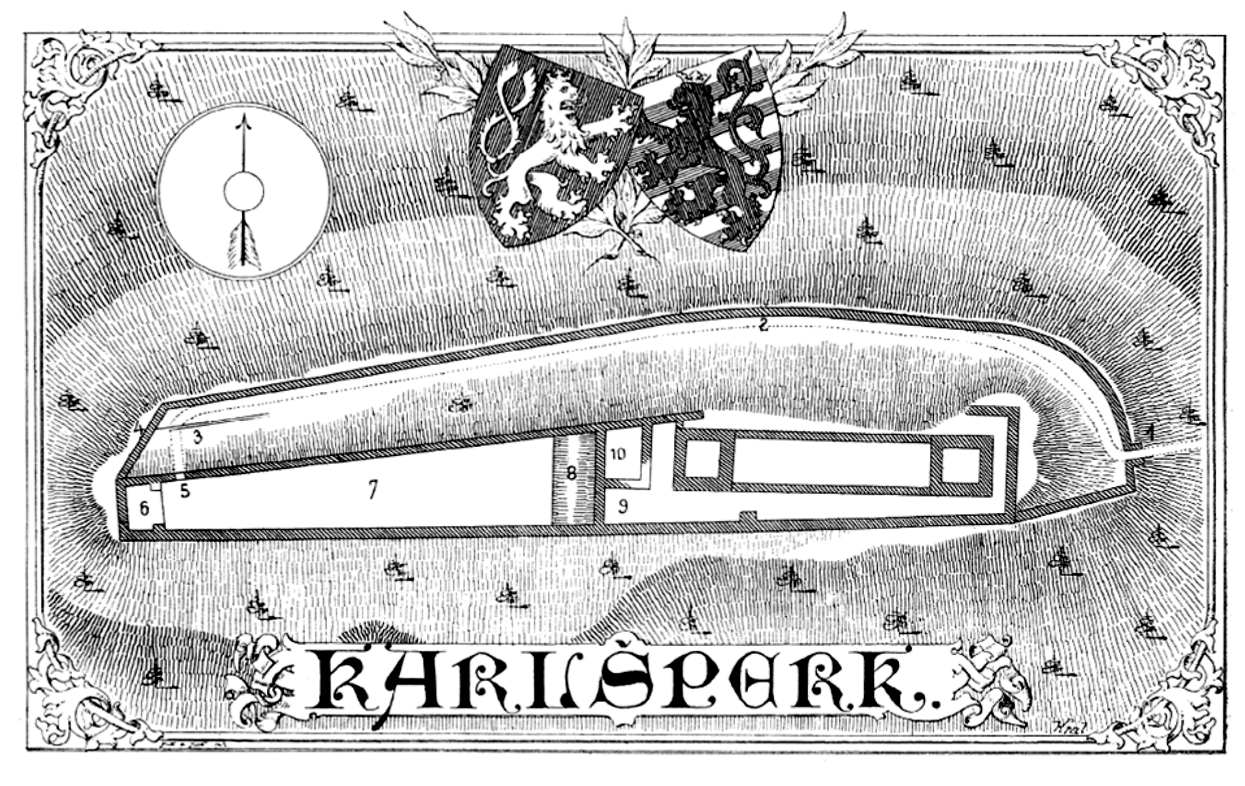 Kapšerk – půdorys hradu od Vojtěcha Krále z Dobré Vody publikovaný roku 1897; popis: 1 – první brána, 2 – cesta, 3 – příkop, 4 – branka, 5 – druhá brána, 6 – konírna, 7 – předhradí, 8 – příkop, 9 – brána, 10 – podsklepená budova, 11 – palác